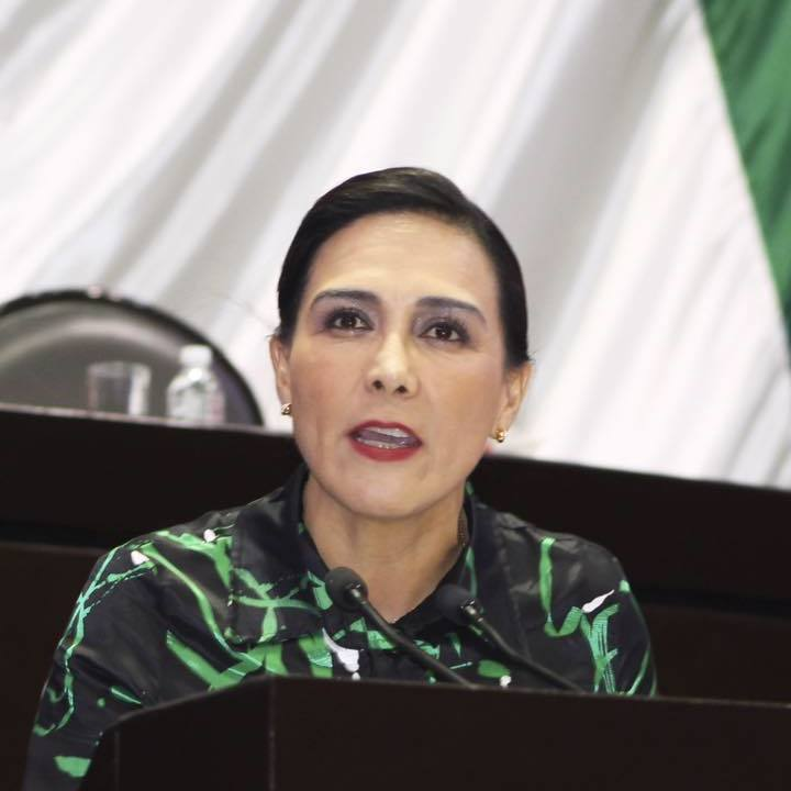 Diputada Federal por la quinta circunscripción